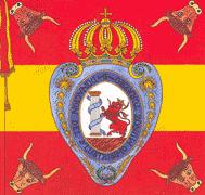 Bandera que regaló Diego Muñoz Torrero a la Milicia Nacional de Cabeza del Buey durante el Trienio Liberal y que se encuentra en el Congreso de los Diputados de Madrid.